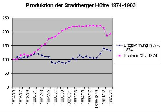 Zusammenstellung der Produktionsergebnisse der Stadtberger Hütte AG 1874-1903 nach: Bericht des Vorstandes der Actiengesellschaft Stadtberger Hütte für das Betriebsjahr (1874-1903)